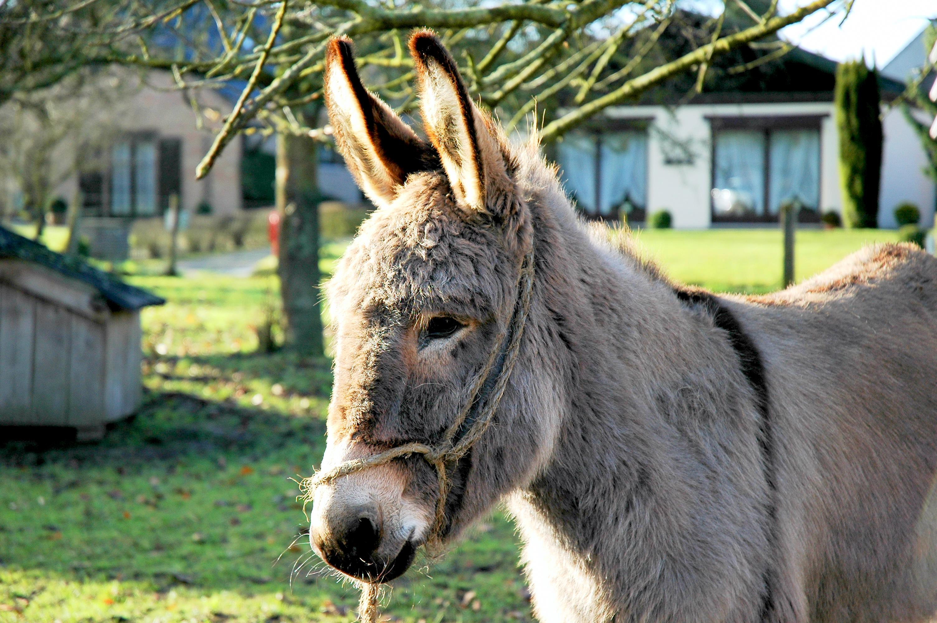 Ezel kinderboerderij bornem